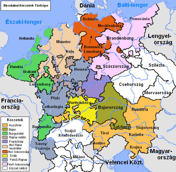 A Német-római Birodalom körzetei 1512-ben